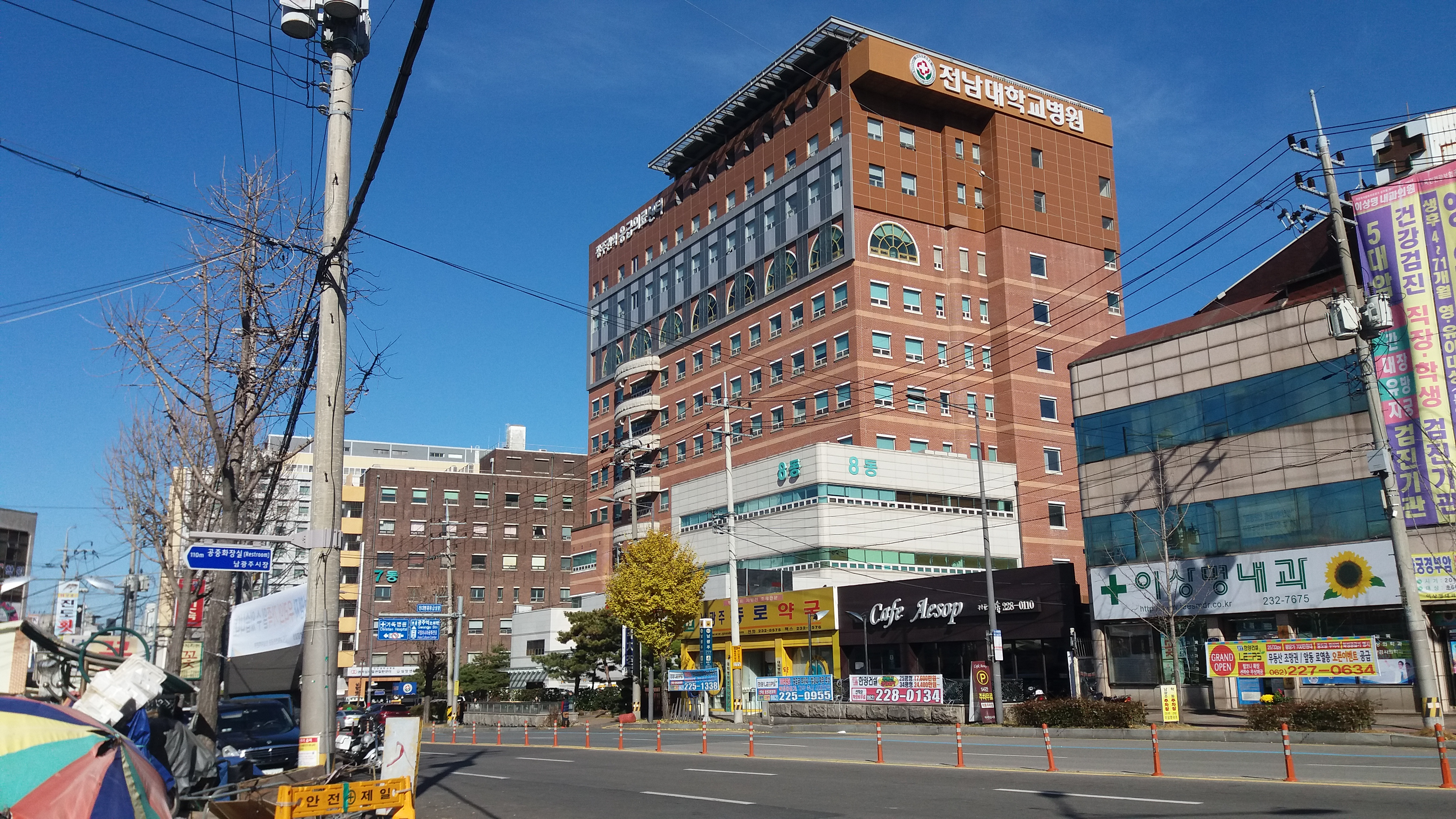 전남대학교병원